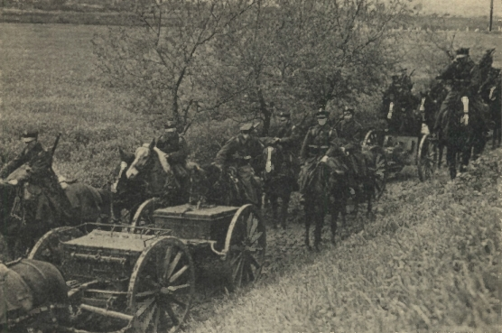 Artyleria konna [Opis oryginalny]